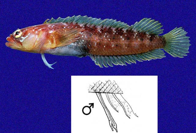 Starksia galapagensis